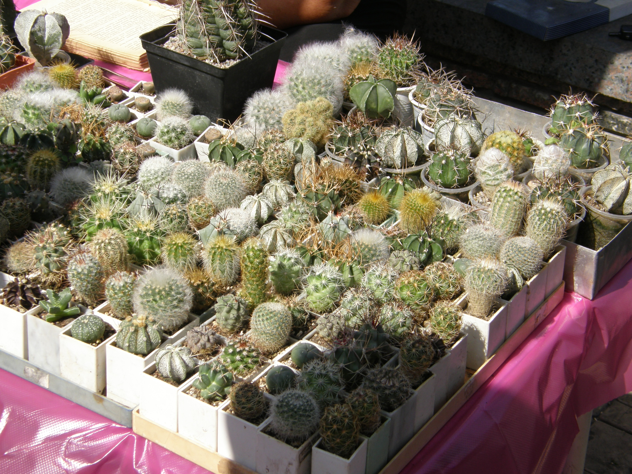 Донецк. Празднование дня города и дня шахтёра. Выставка цветов